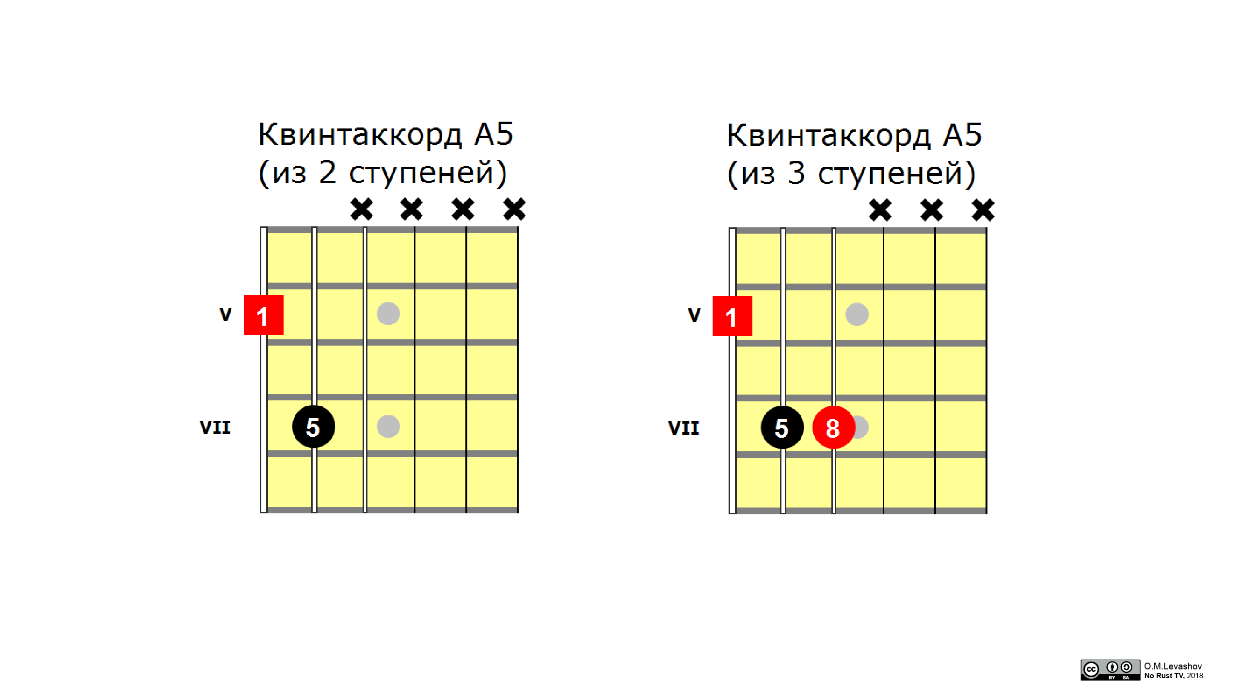 Квинтаккорд на основе 2-х и 3-х ступеней